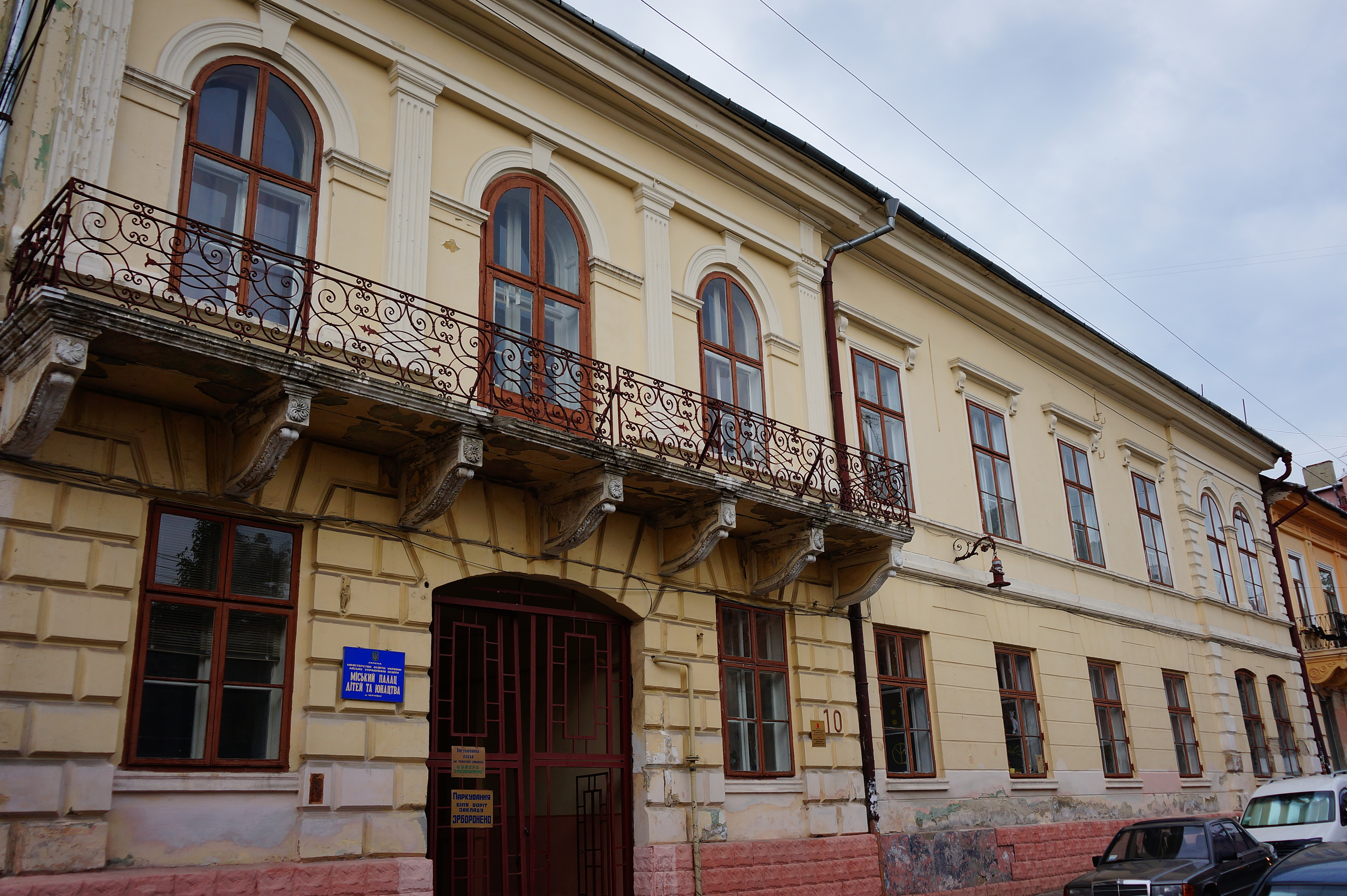 Будинок Буковинського крайового сейму., Чернівці, вул.Шептицького, 10